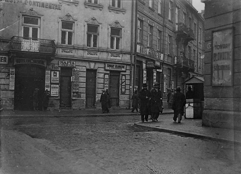 Нальвайка 7 Львів